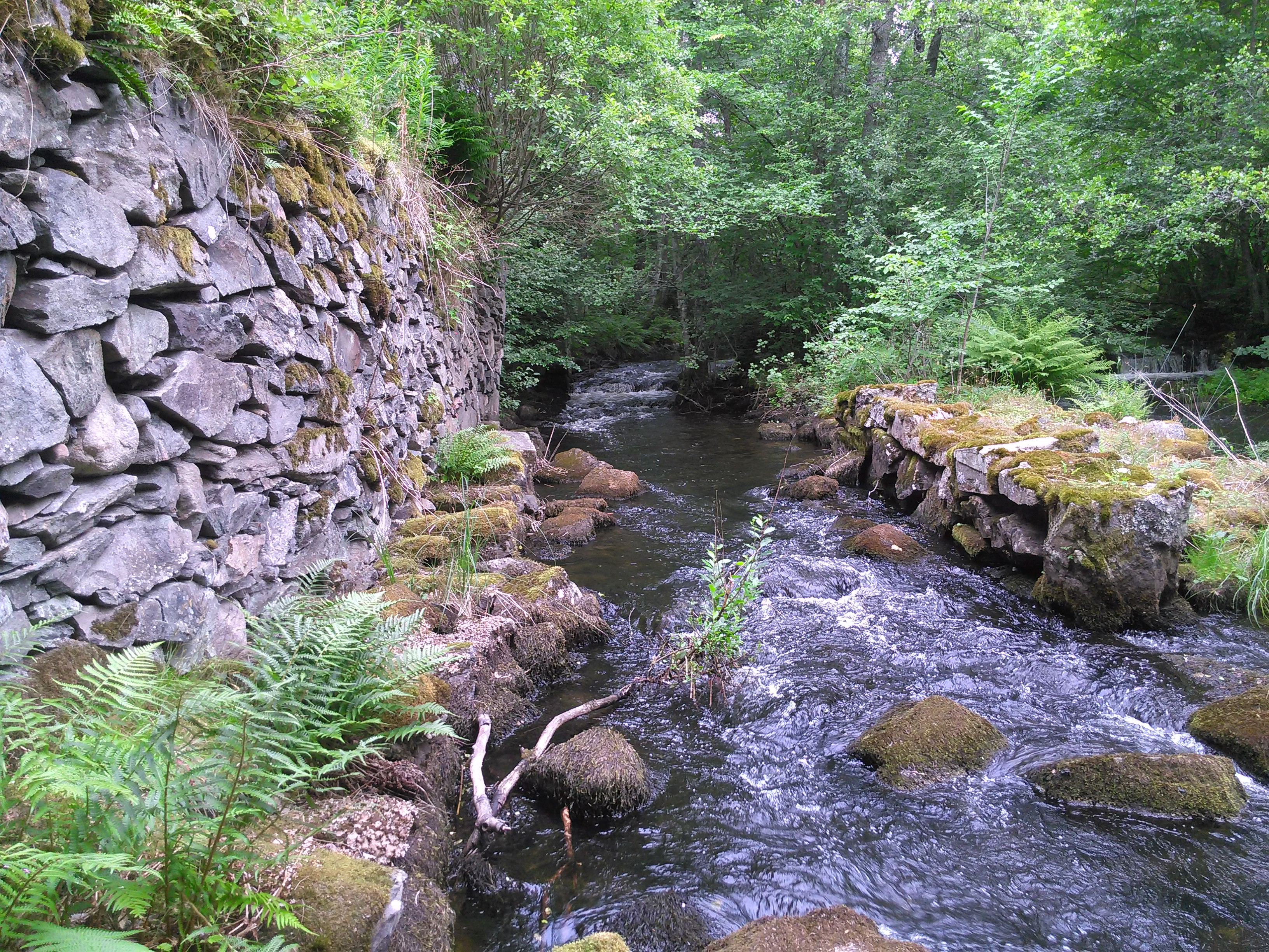 Nyckelås naturreservat och ån Tidan strax nedanför sjön Brängen. På bilden syns en gammal kvarn.